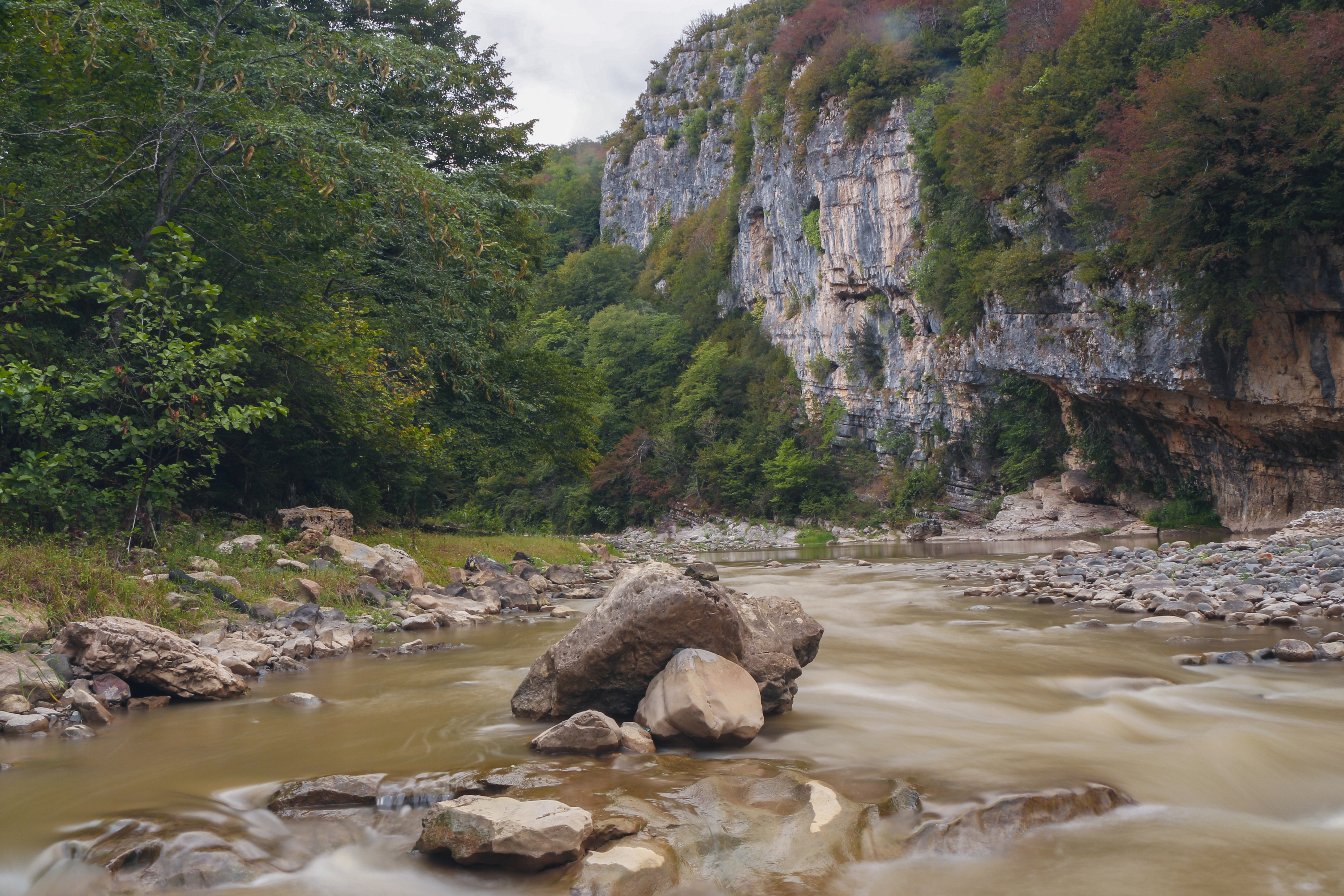 ბუნების ძეგლი წარმოადგენს ულამაზეს კოლხური ტყით დაფარულ, განსაკუთრებული სილამაზით გამორჩეულ მდ. წყალწითელას კანიონისებურ ხეობას.